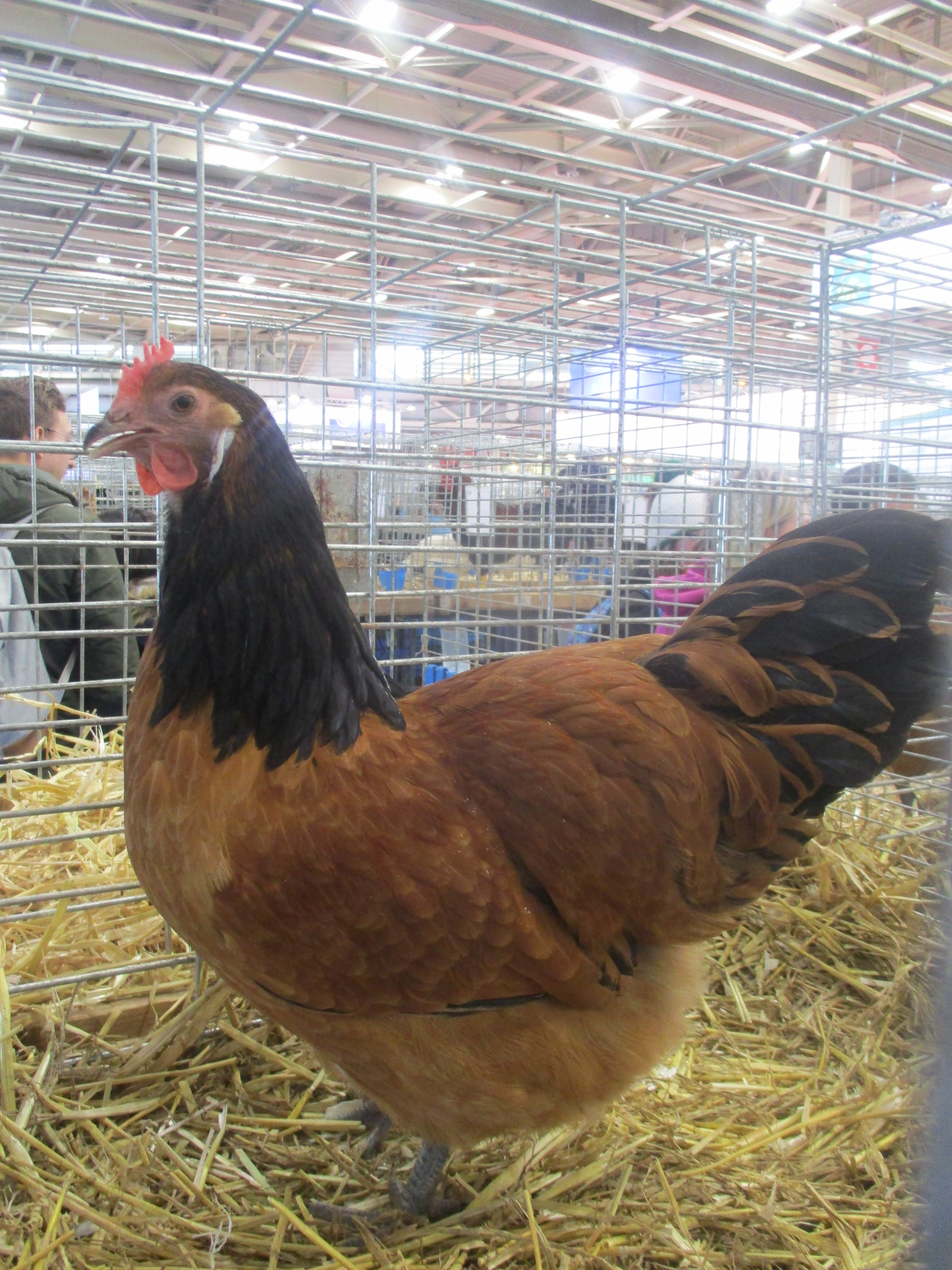 Poule vorwerk au salon de l'agriculture 2018.